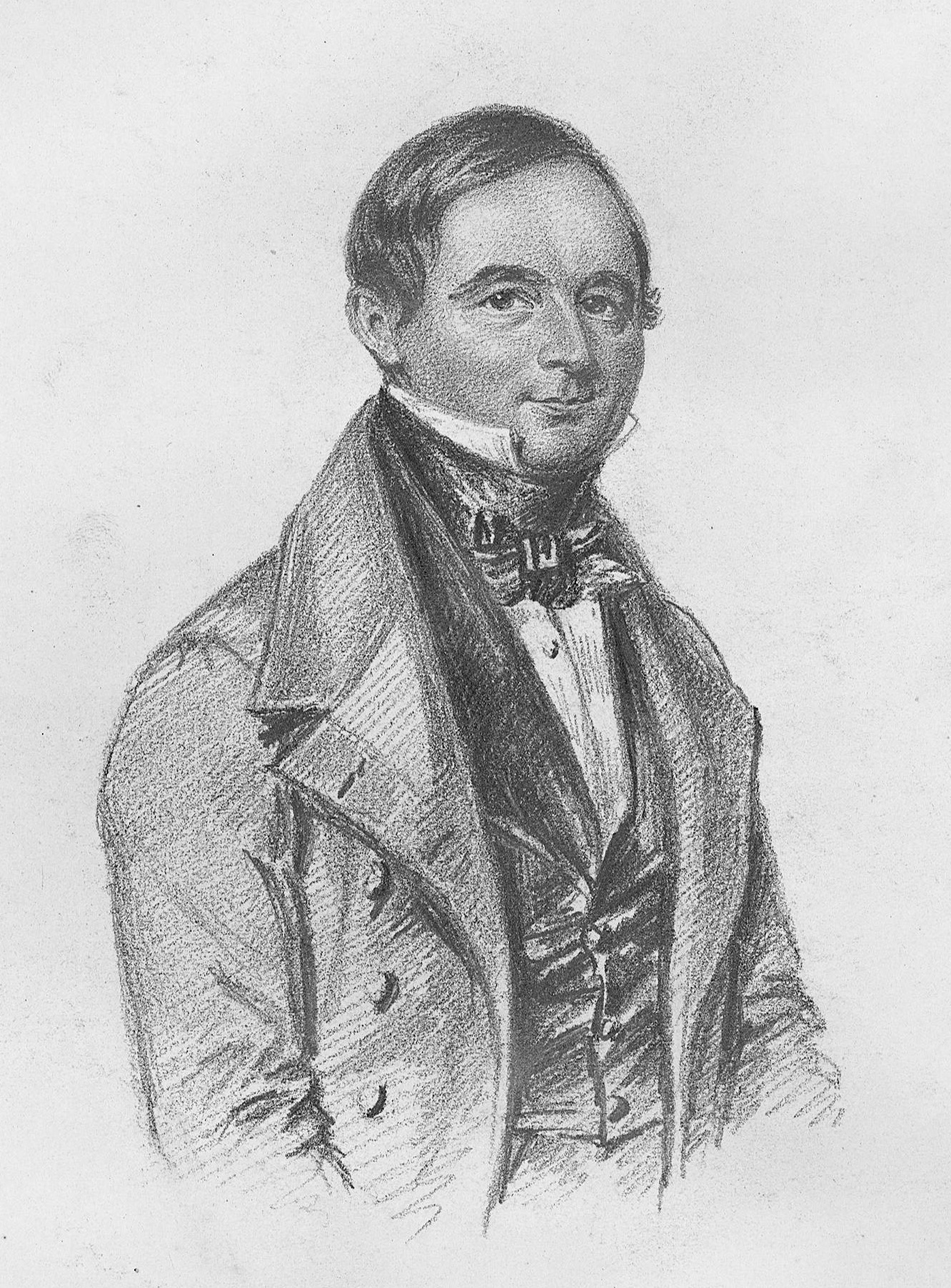 Carl Gustaf Schönbeck (1786-1860)